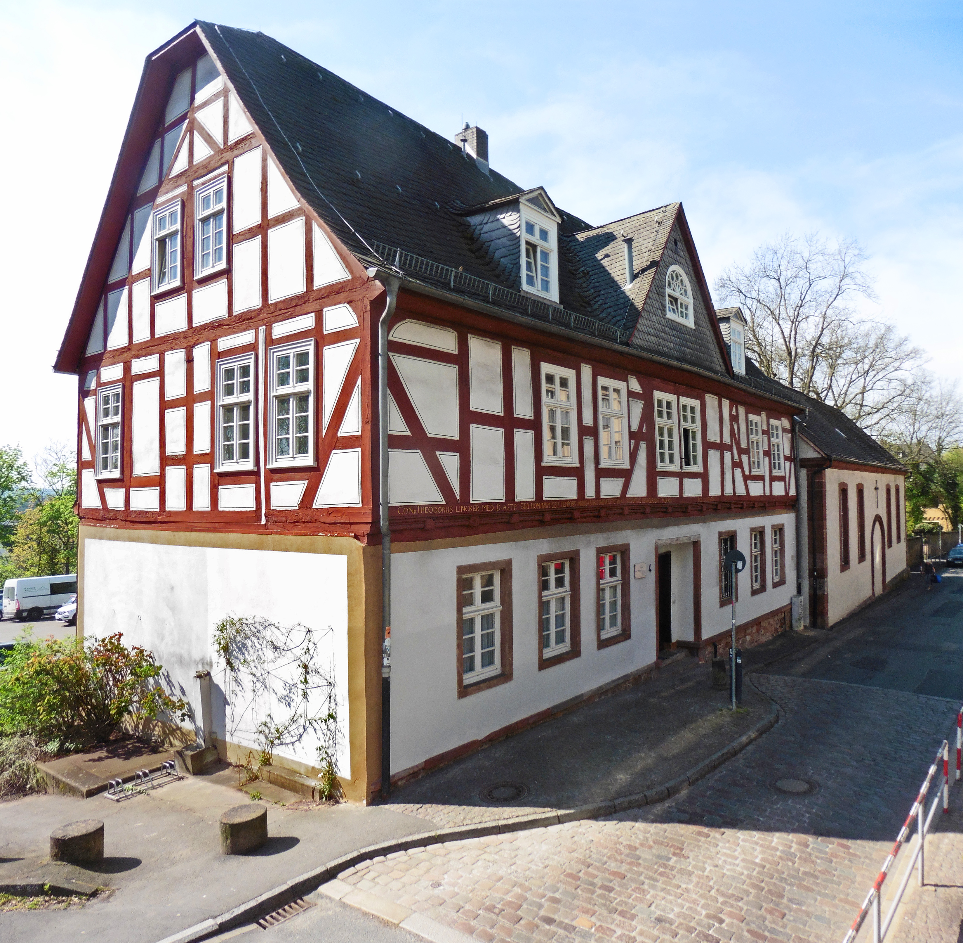 Marburg, "Adam-Krafft-Haus", Wohnhaus Barfüßertor 4, neu aufgebaut 1657 durch Conrad Theodor Lincker († 1660), dessen Grab sich am angrenzenden Friedhof befindet. Westlich angrenzend die Auferstehungskirche, Barfüßertor 6 und der Friedhof am Barfüßertor. Ansicht von Nordosten. Inschrift: CONr THEODORUS LINCKER MED. D. AETP. SEU HOMINUM SEU TEMPORIS INJURIA DIRUTUm REAEDIFICARIET ET ELEGANTIUS FIERI CURABAT. MDCLVII IPSE FACIET